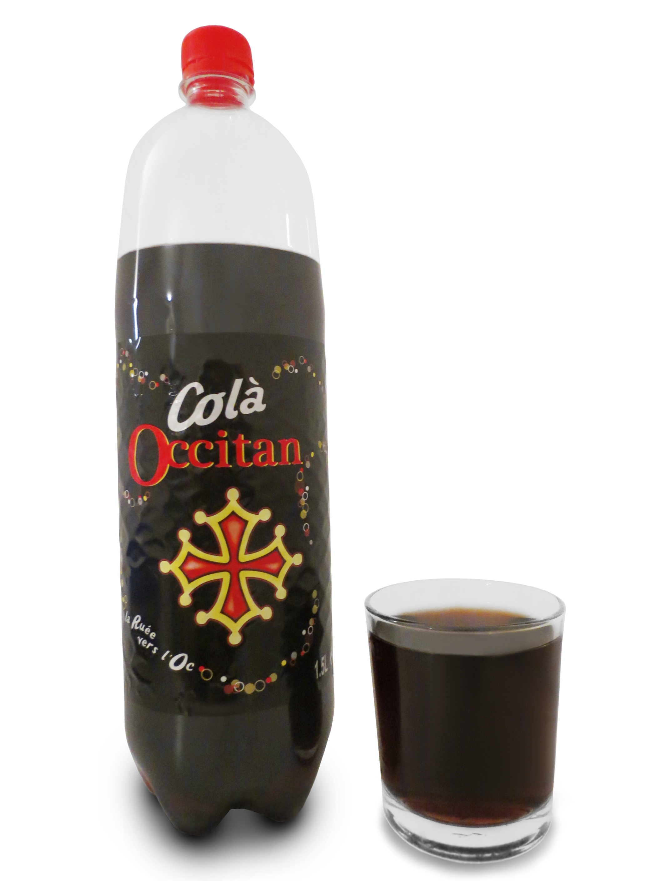 Bouteille et verre de Colà Occitan; cola régional, embouteillé par l'entreprise L'Abeille, à Cholet.